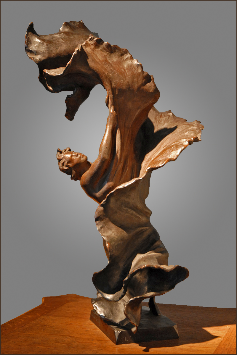 Statuette Loïe Fuller de Fernand Massignon, dit Pierre Roche (1855-1922) Paris, création du modèle vers 1894 E. Gruet, fondeur Paris, édition, vers 1901 Bronze, socle en marbre noir Musée des ars décoratifs Espaces sur l'art nouveau On trouve dans les musées de nombreuses représentations de Loïe Fuller en train de danser. voir celle que j'ai photographiée à Budapest et qui est magnifique la photo officielle n'est pas très bonne mais l'objet est accessible avec sa notice